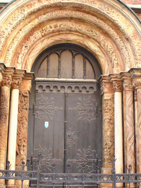 Wrocław, kościół p.w. św. Marii Magdaleny, ob. katedra polsko-kat., 1342-1360, 1 poł. XV, 1888-1992, po 1945